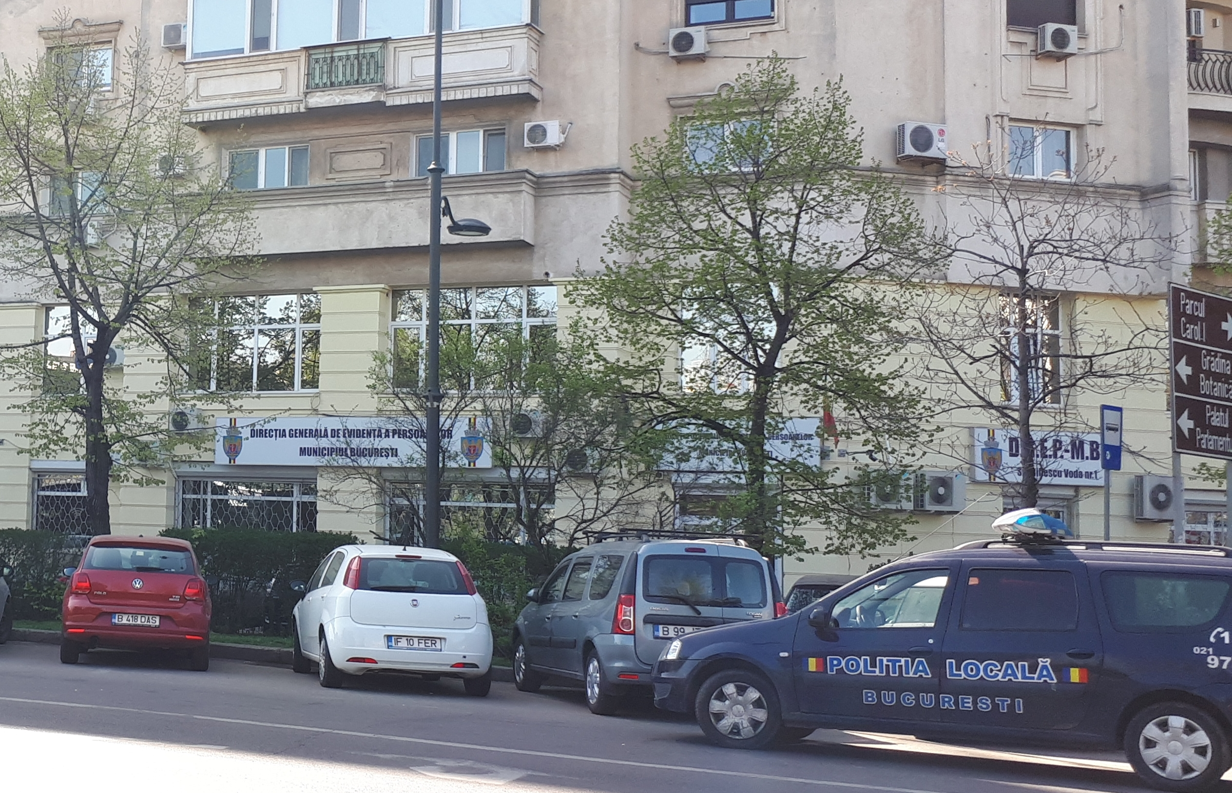 Direcția pentru Evidența Persoanelor Bucuresti